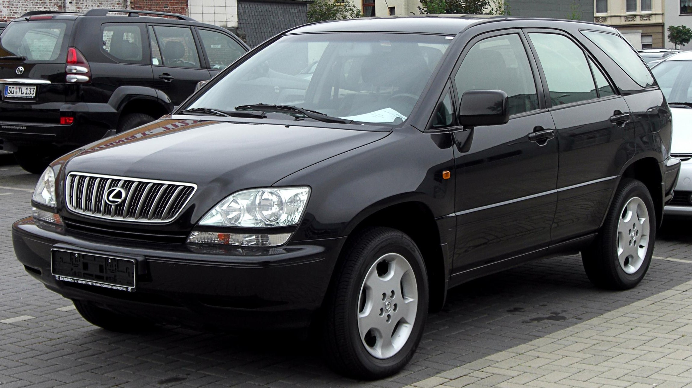 Lexus RX300